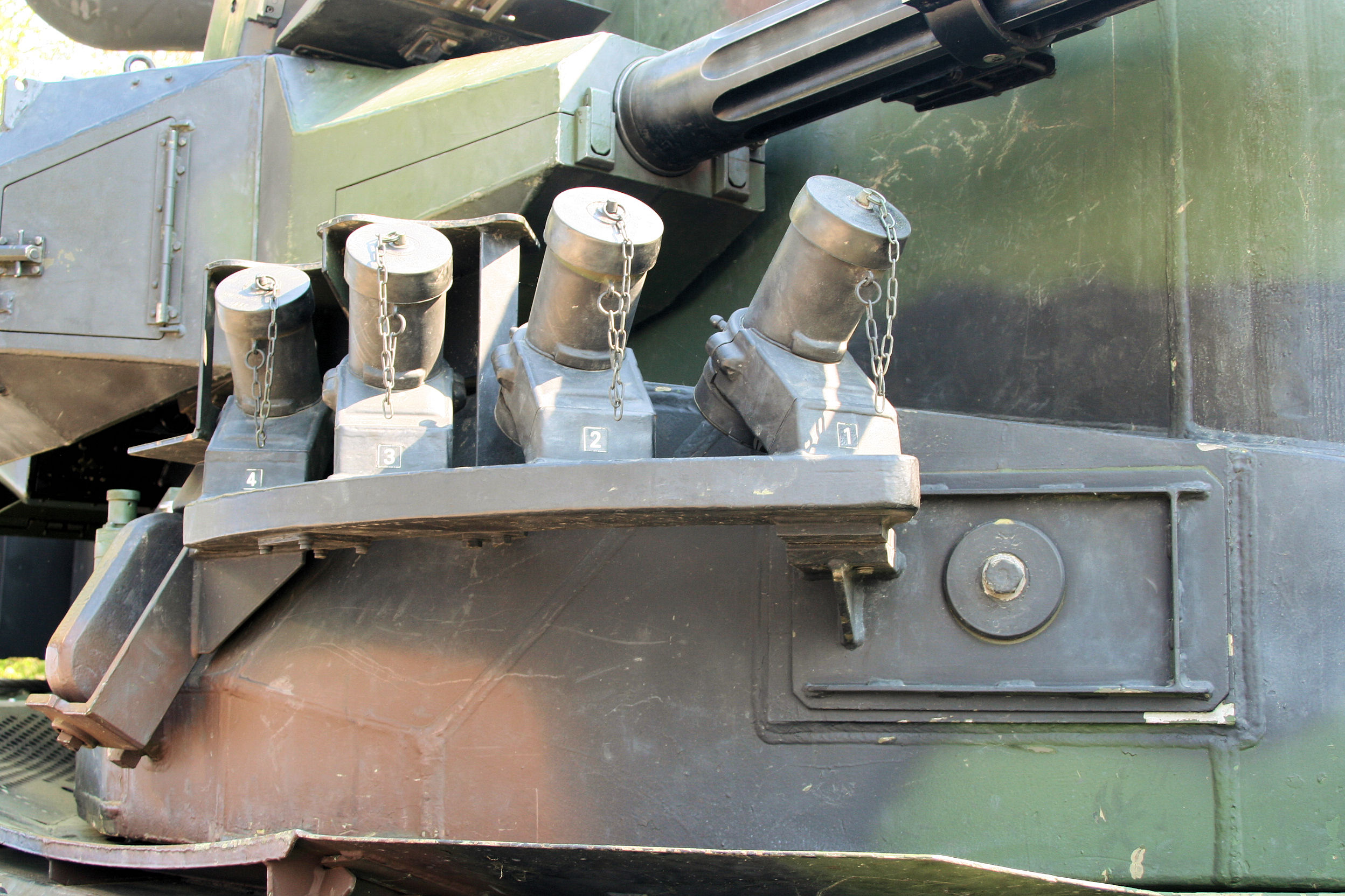 Gepard 1A2 Nebelmittelwurfanlage Gepard 1A2 fog launcher